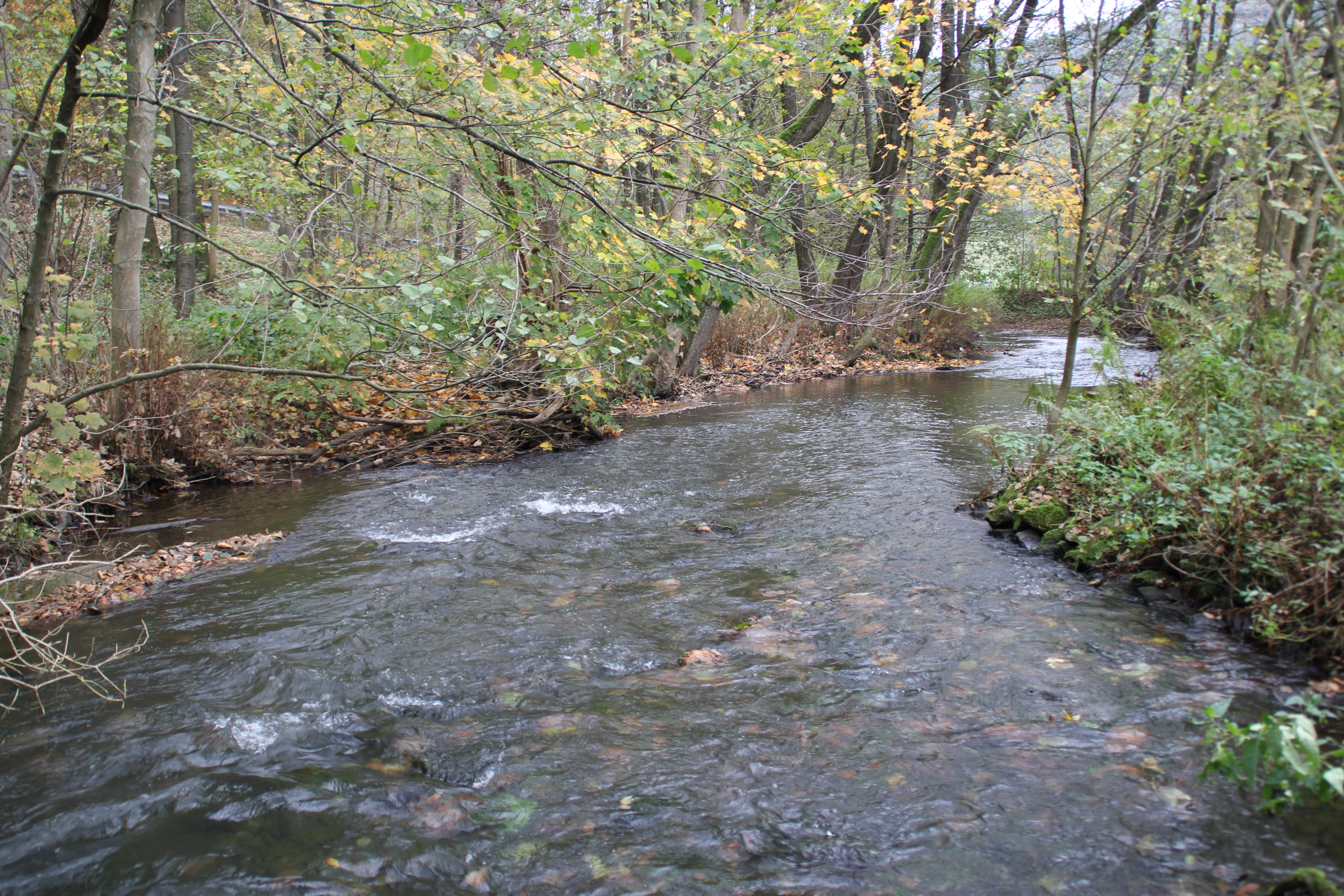 Der Marbach unterhalb des Marbach-Stausees bei Erbach im Odenwald